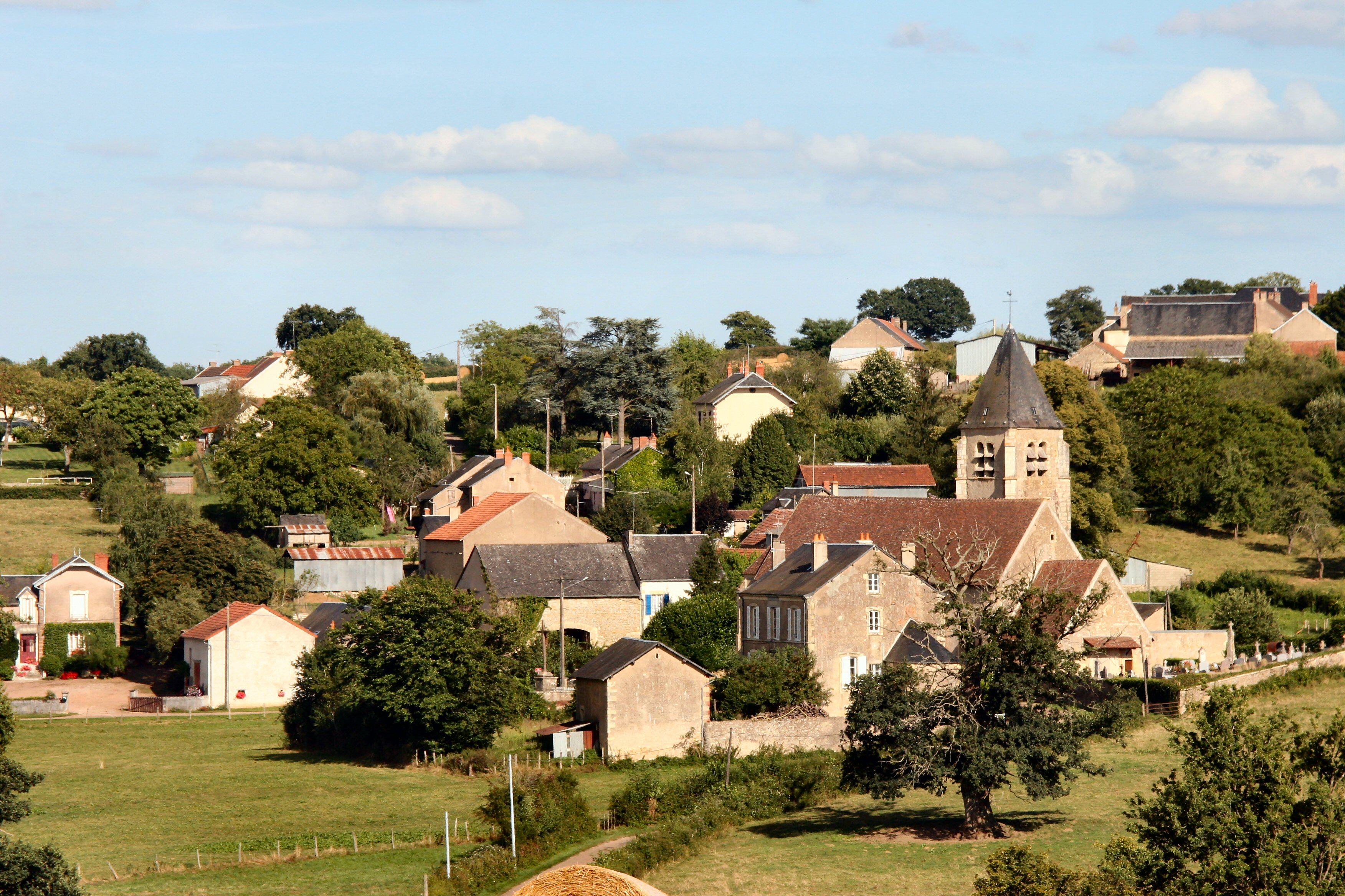 Vue generale du bourg de Germenay 58800